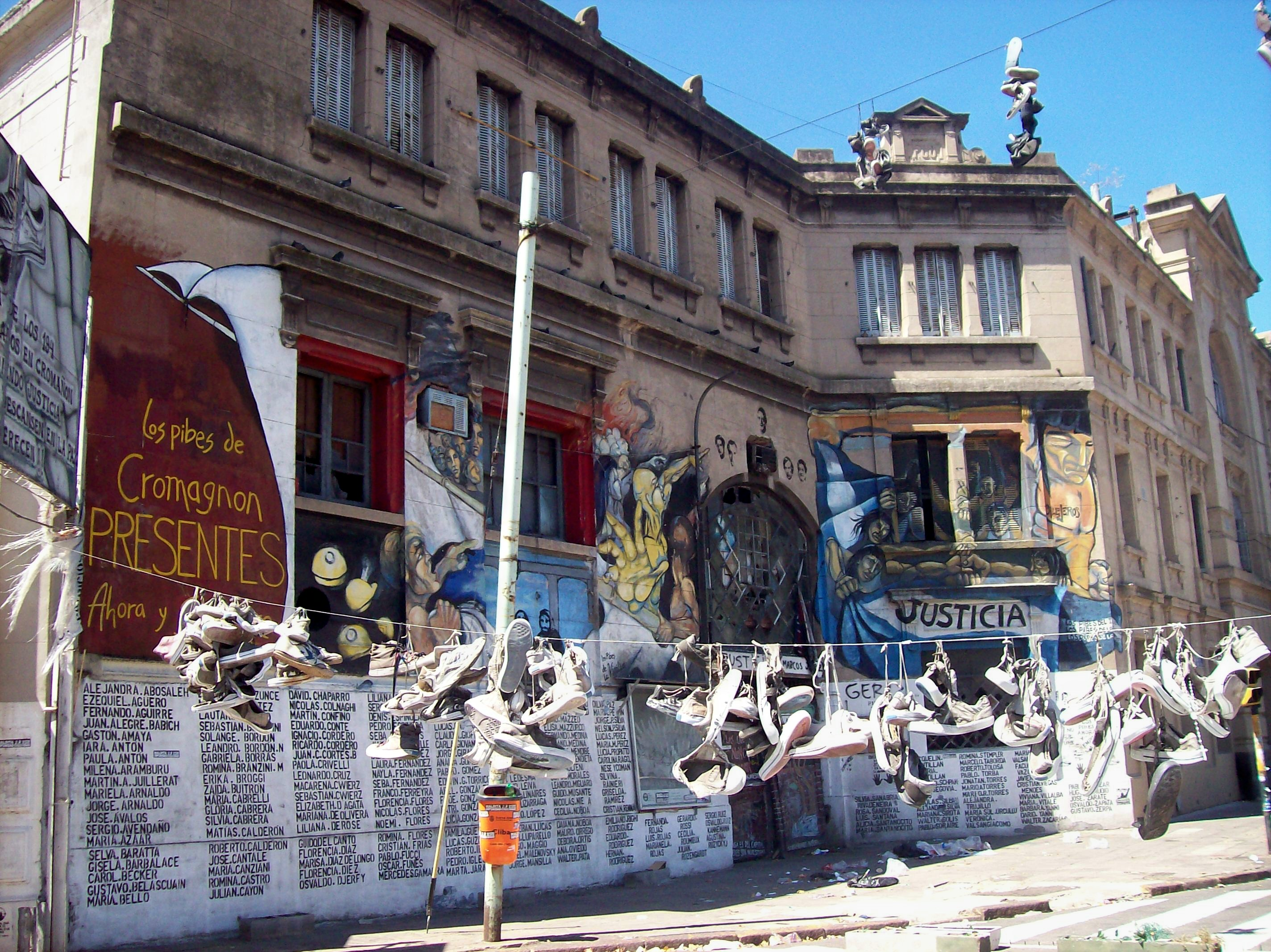 Plaza de la memoria, República Cromañón, en donde dio a lugar la tragedia.